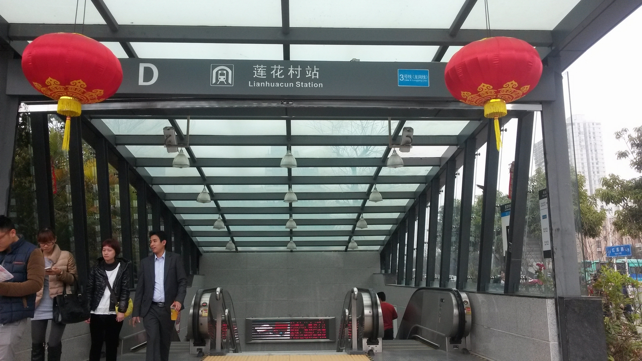 深圳地铁莲花村站D出口